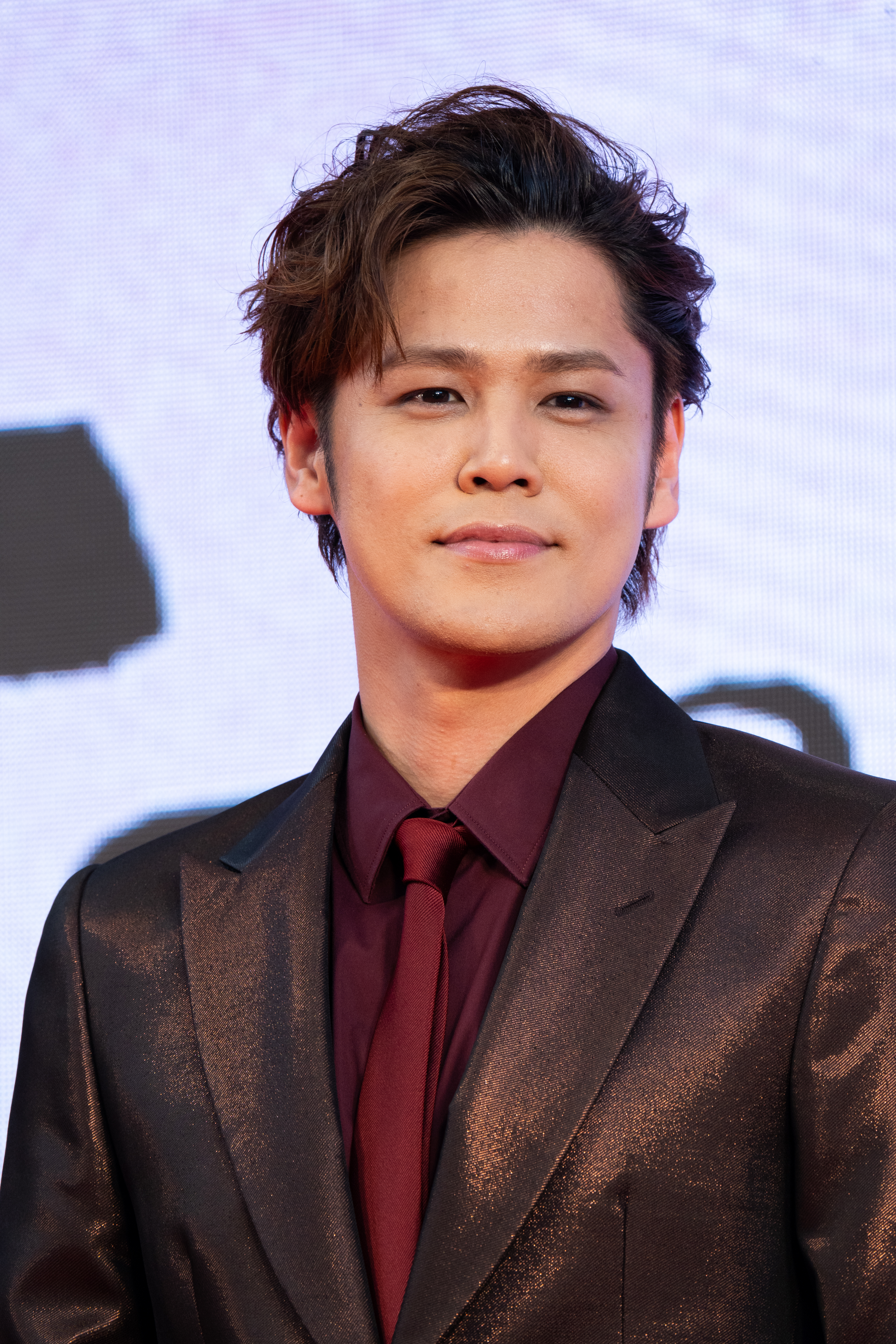 第32回 東京国際映画祭 オープニングセレモニー 宮野真守 (HUMAN LOST 人間失格)